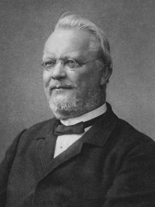 'Porträtt av Rudolf Leuckart (1822-1898), tysk zoolog. :: :: Ingår i serie med fotonr. 6975:1-31.'